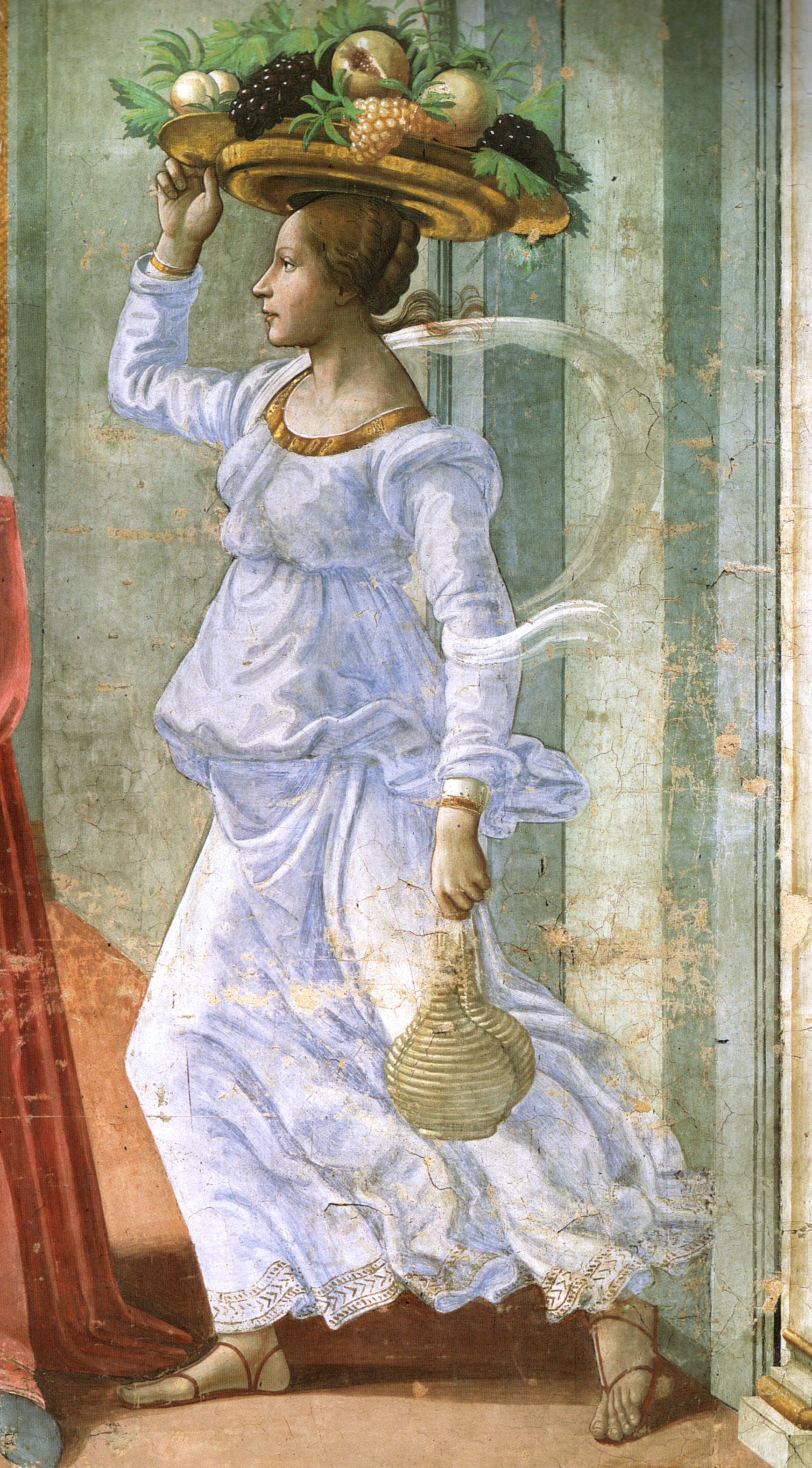 Cappella Tornabuoni frescoes in Florence